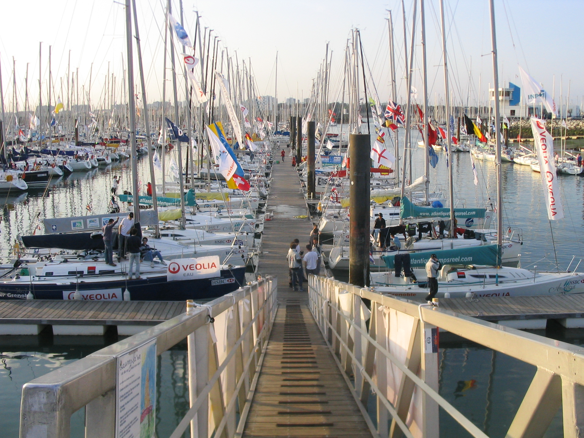 Vue du port des Minimes, La Rochelle, à la 38eme Course Croisière EDHEC